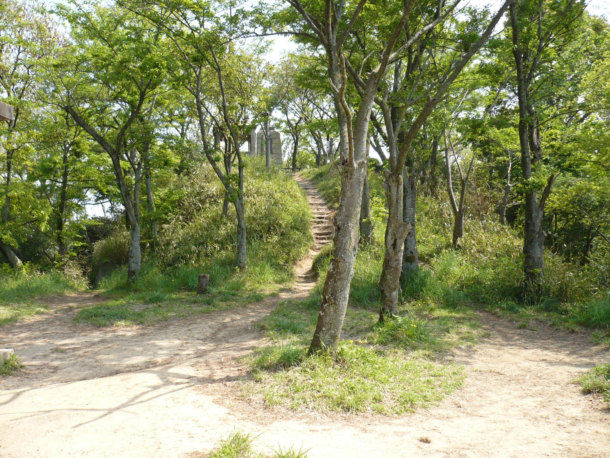 本曲輪、高櫓曲輪跡